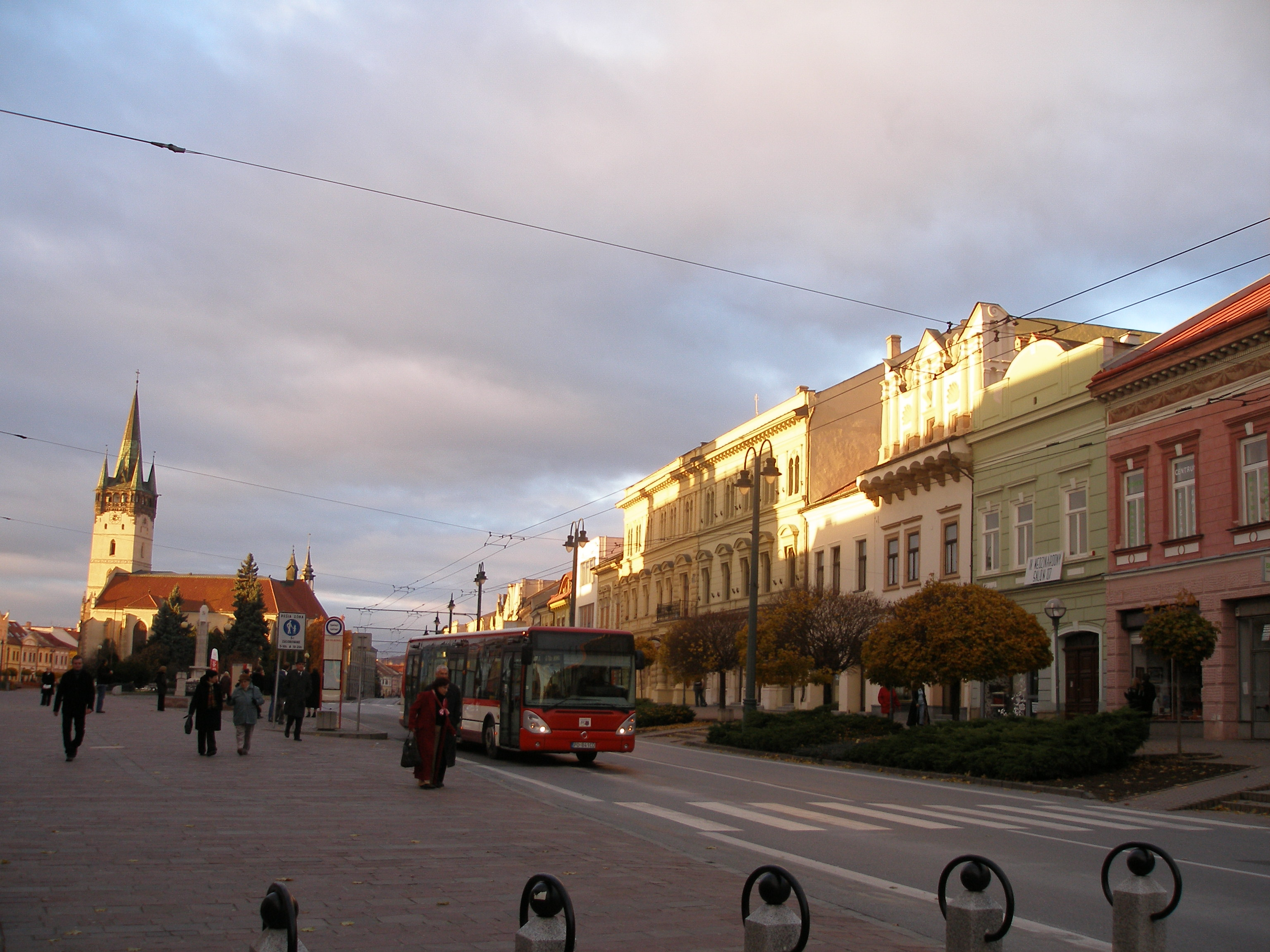 Jesenná nálada v historickom jadre mesta Prešov rok 2007. Irisbus bus.